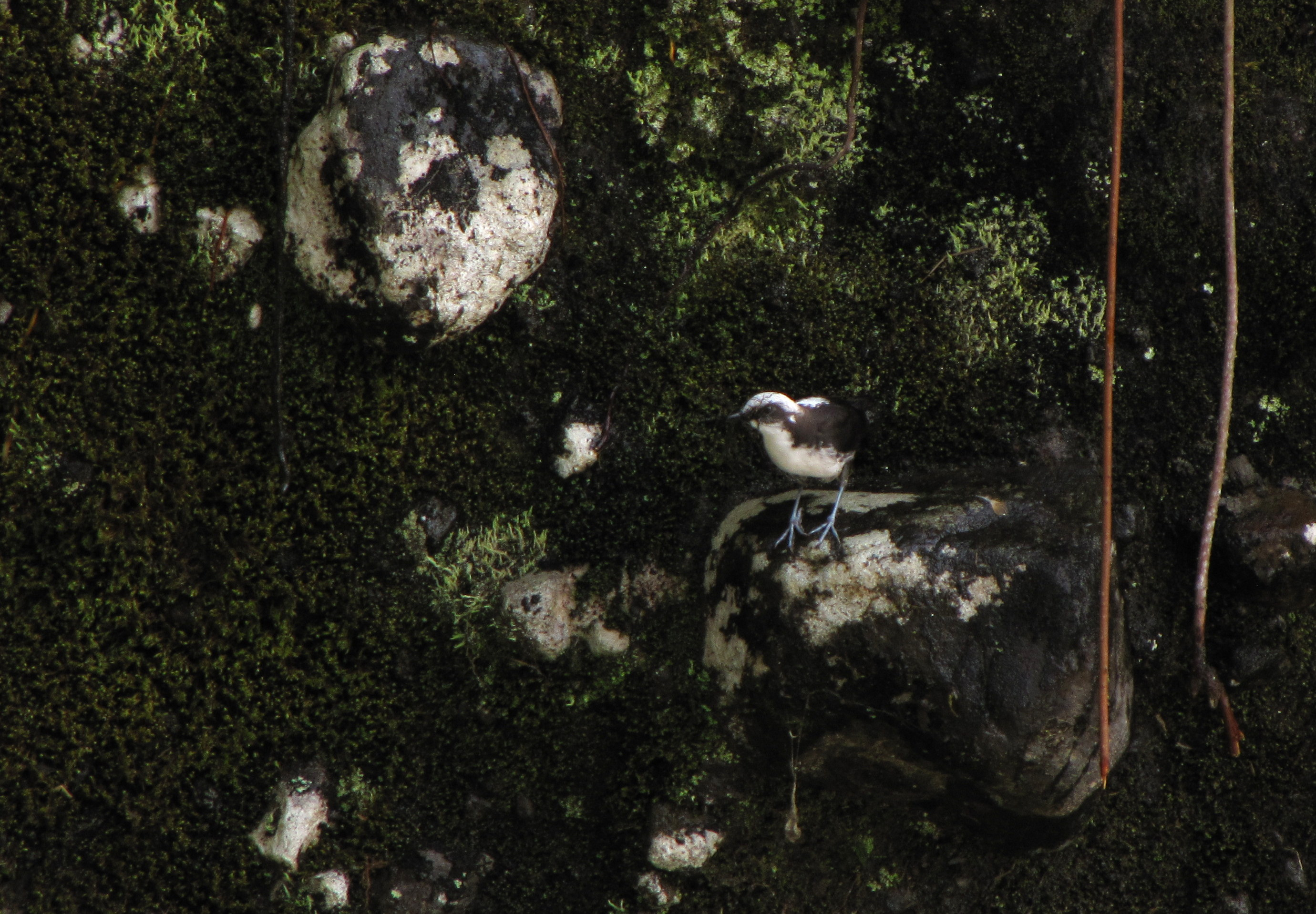 Cinclus leucocephalus (Mirlo acuático)